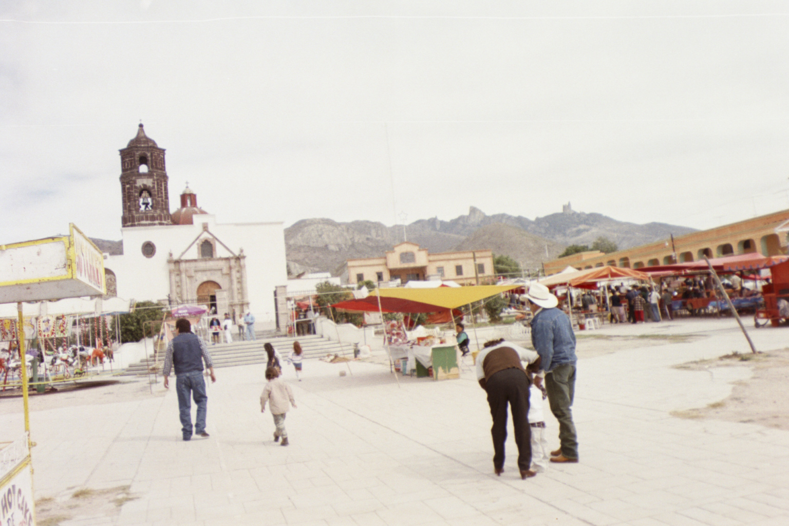 La plaza en frente del Arenal en Hidalgo, MX.